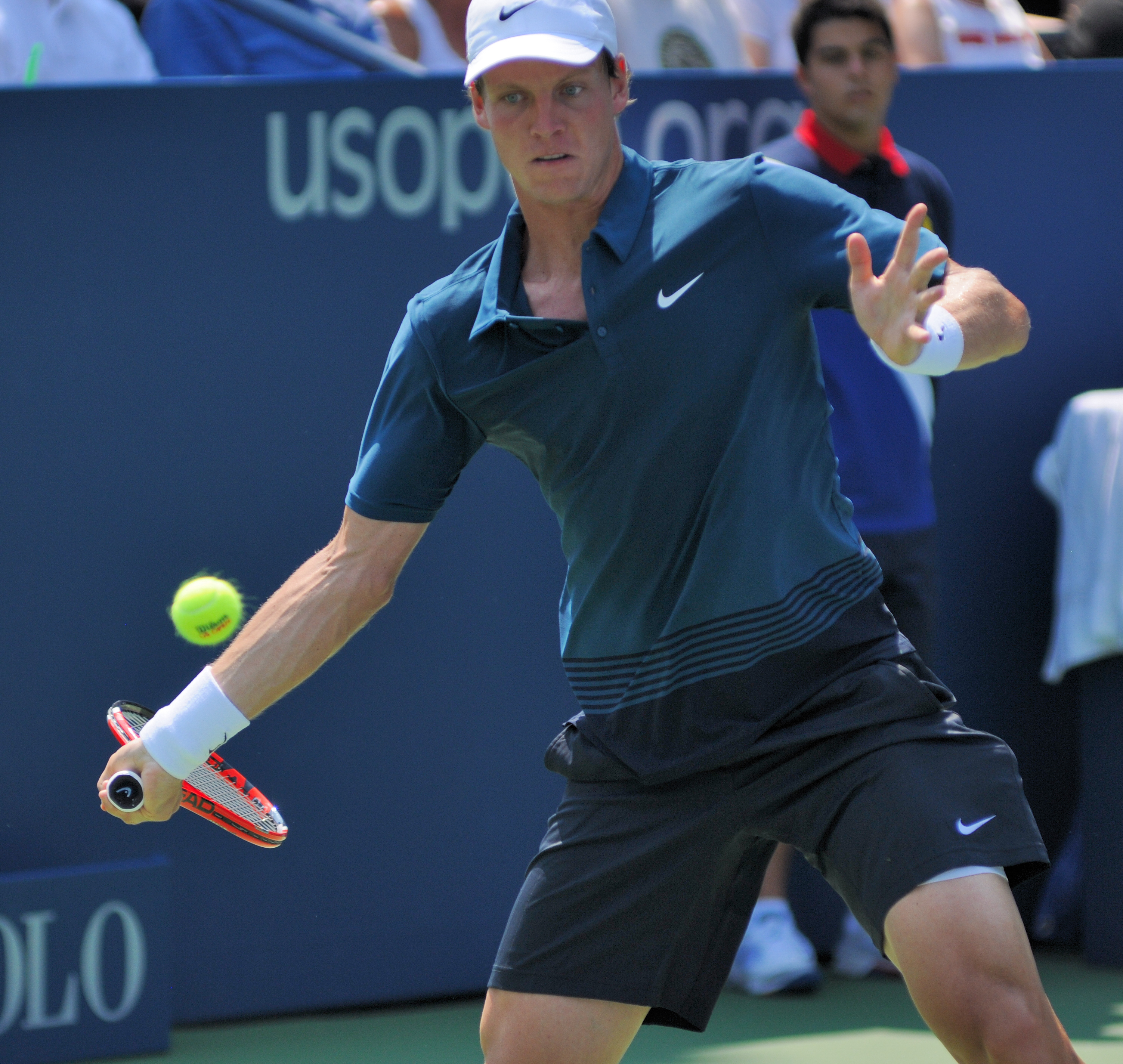 Tomas Berdych - US Open 2010